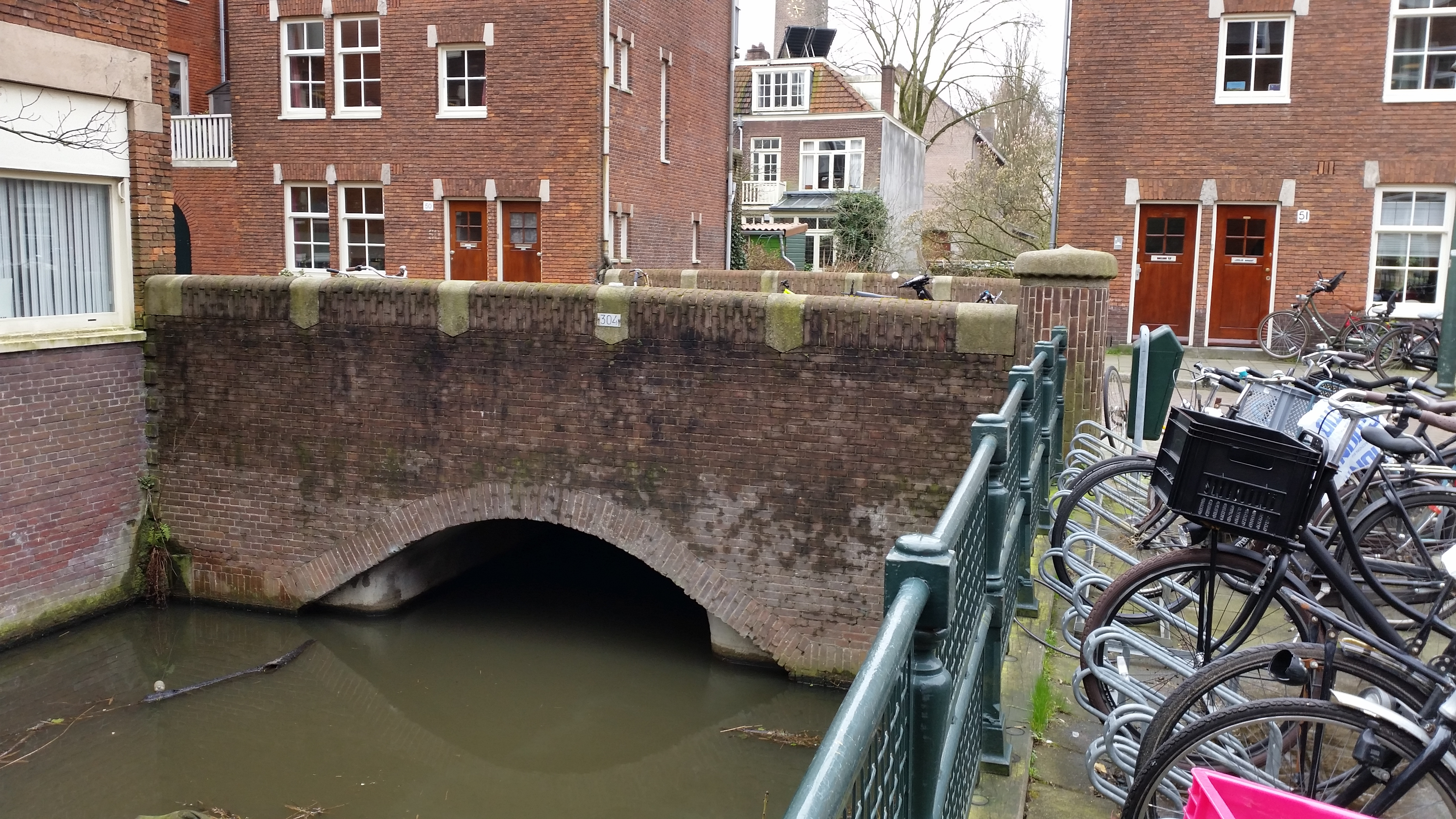 Impressie brug 304 in Amsterdam (februari 2020)